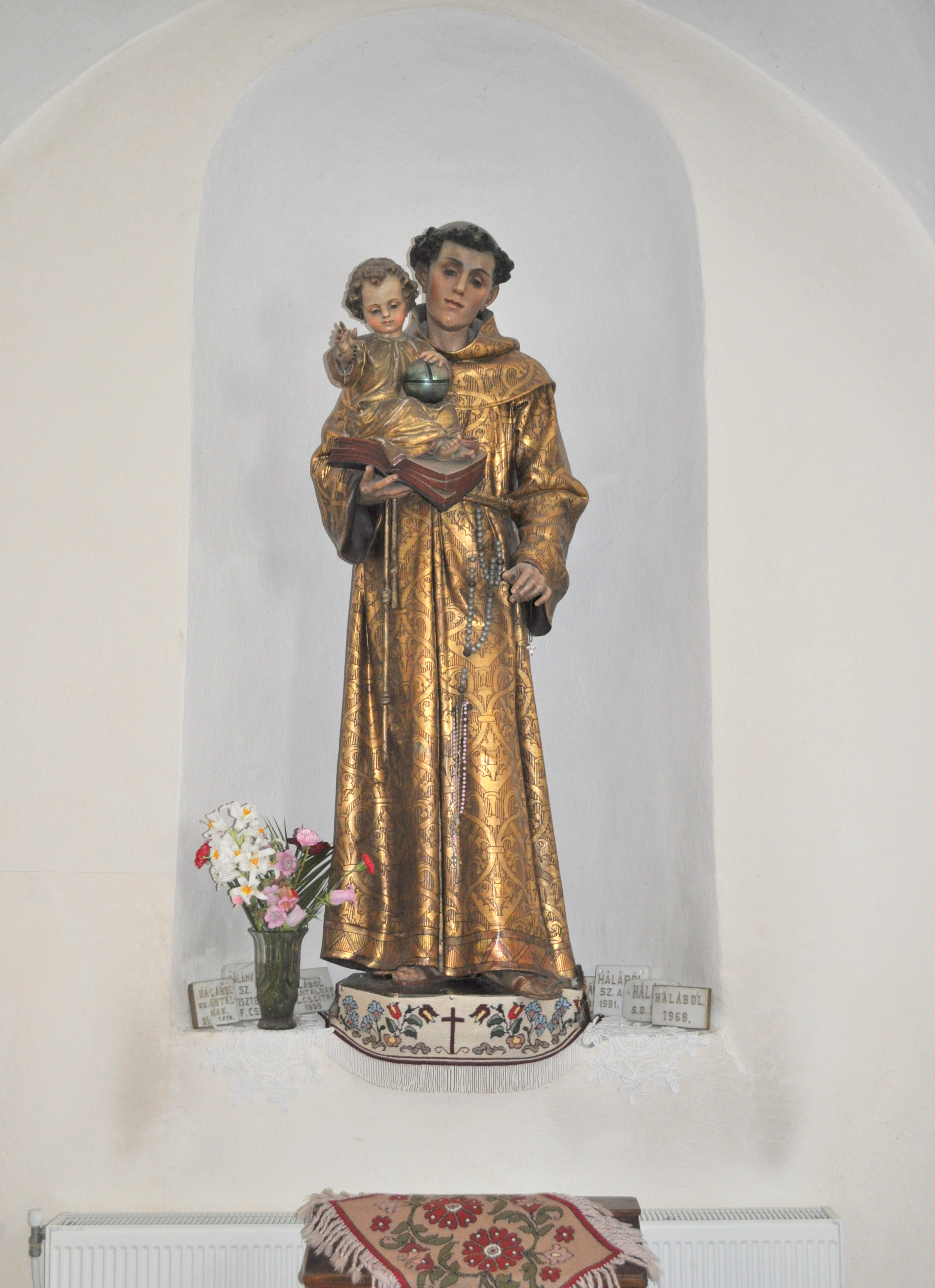 Ditrău, județul Harghita